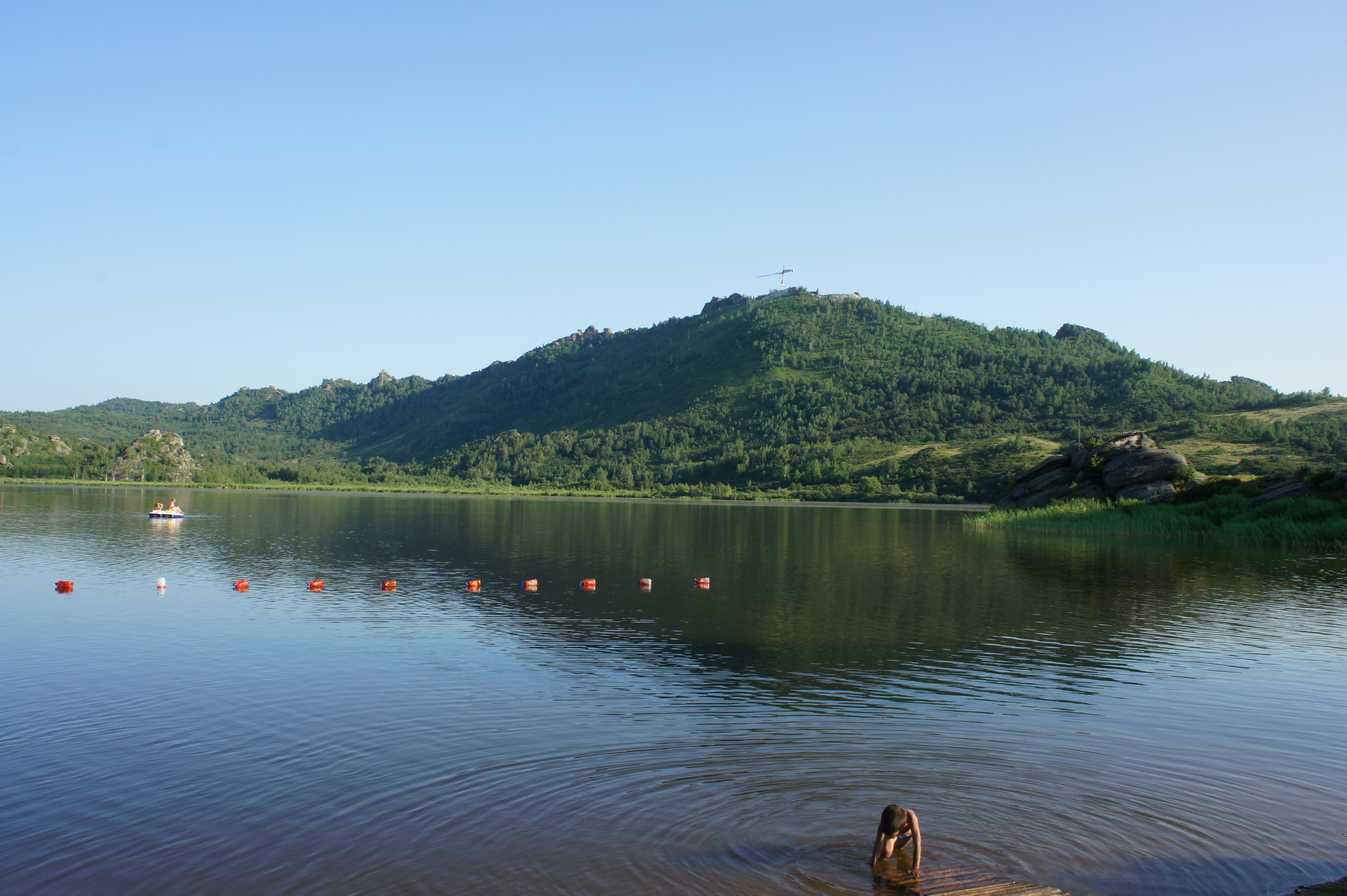 строительство Алтайского Оптико-лазерного центра, 2011 год